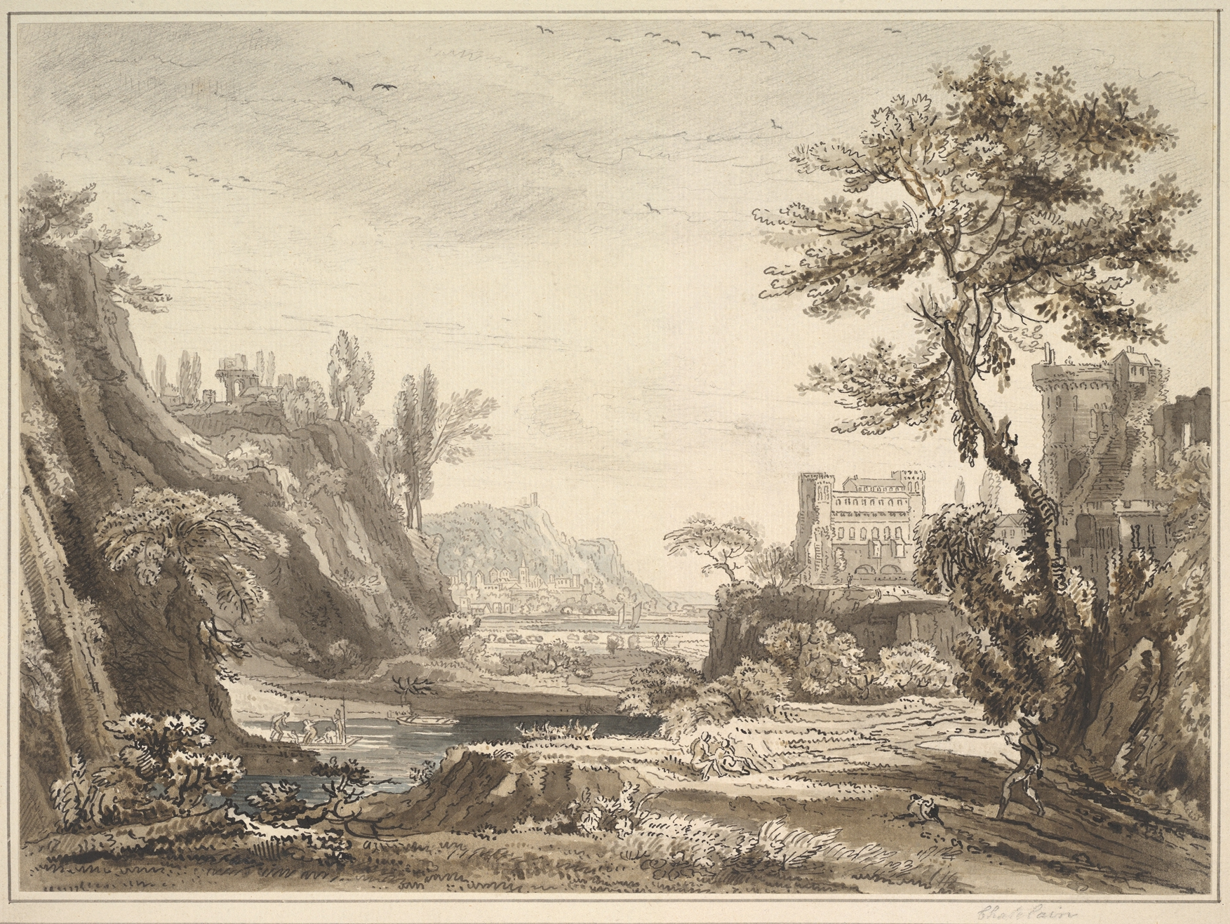 Drawing; Drawings